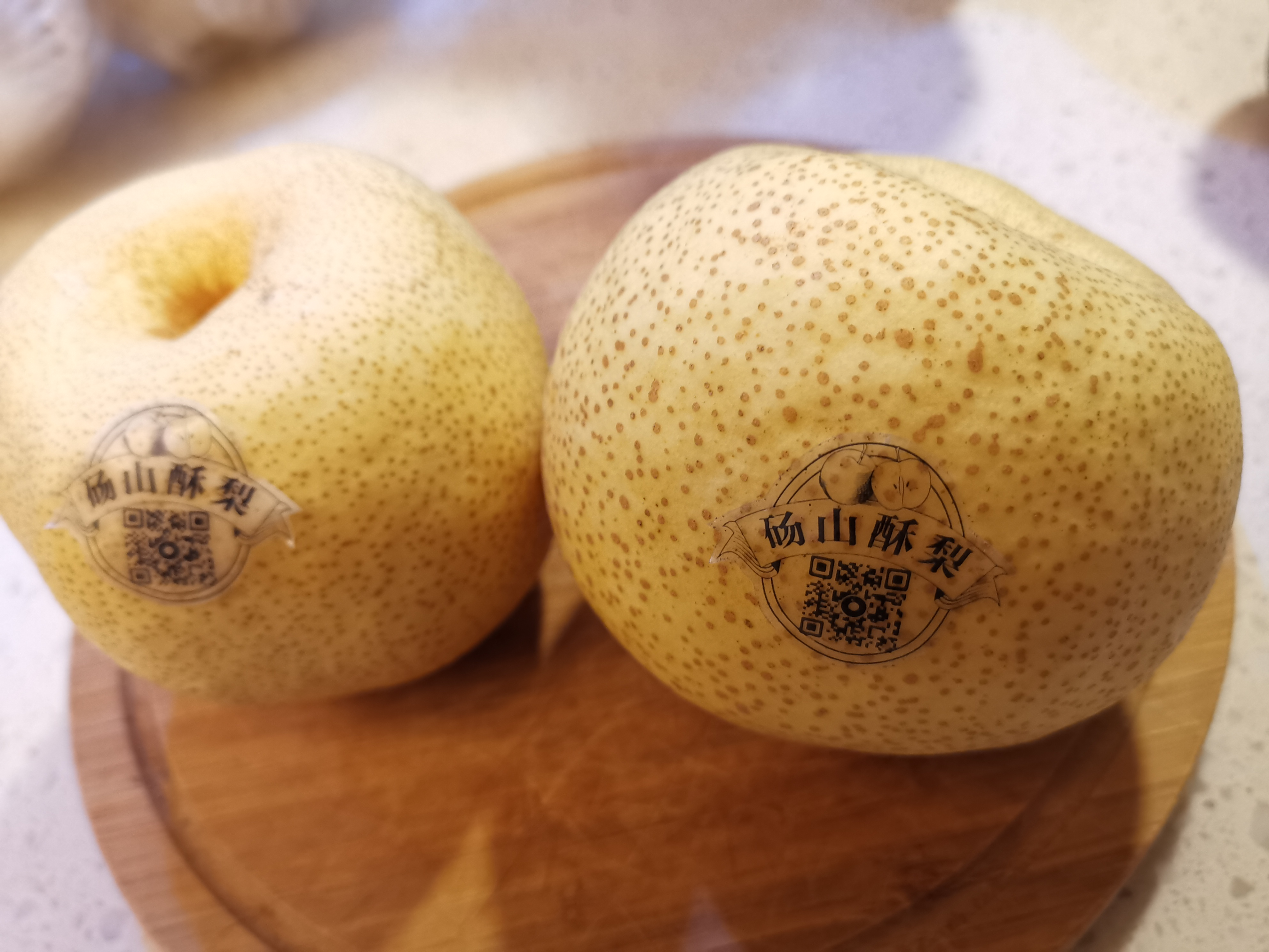 安徽砀山酥梨